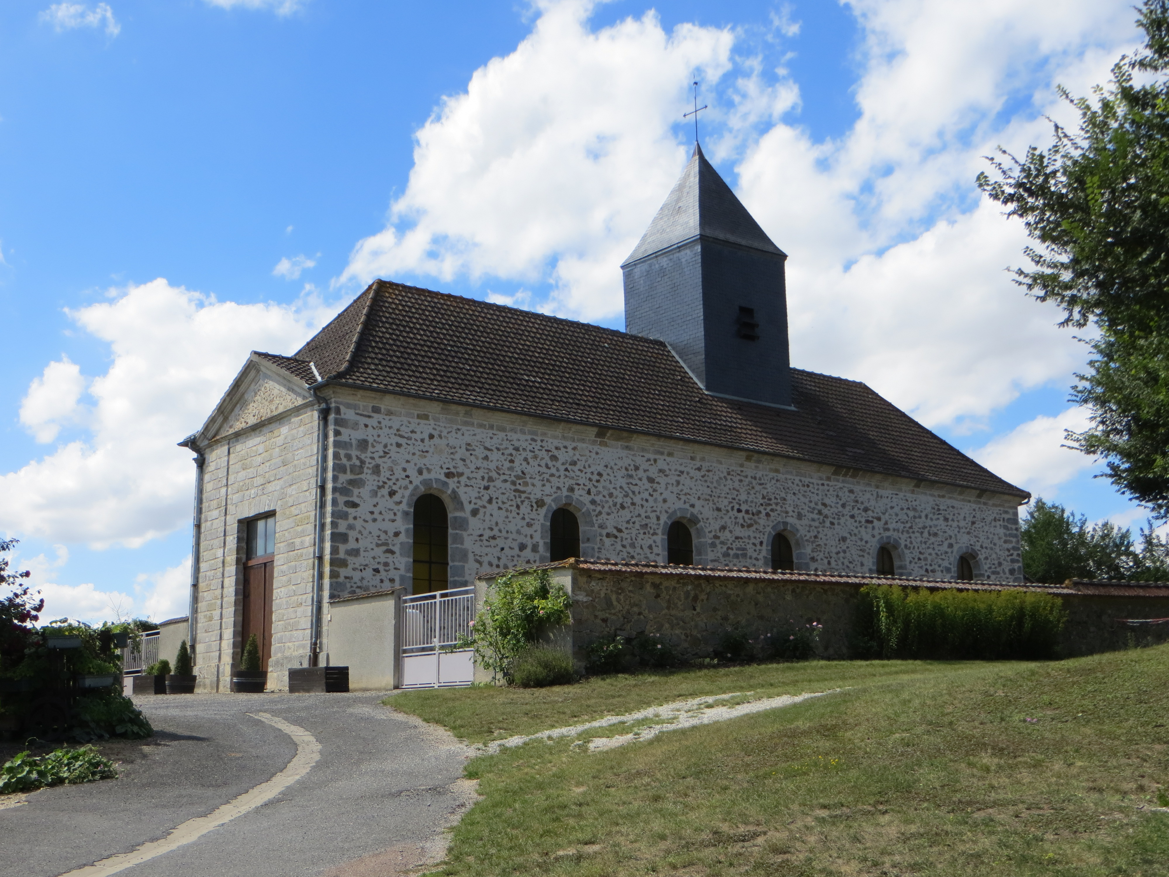 Vue générale de l'église